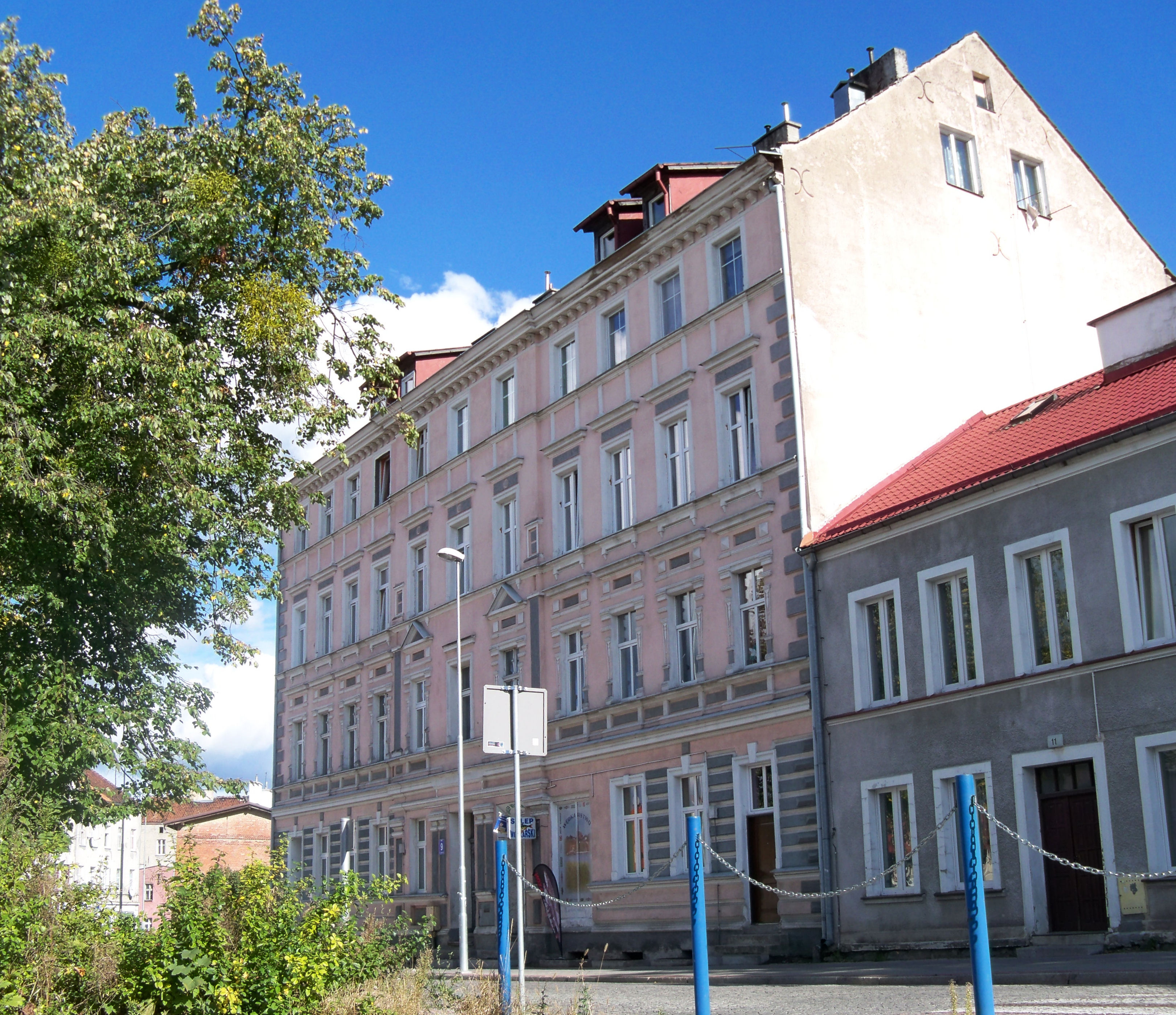 Ostróda, dom ul. Słowackiego 9, Ostróda (gmina miejska)